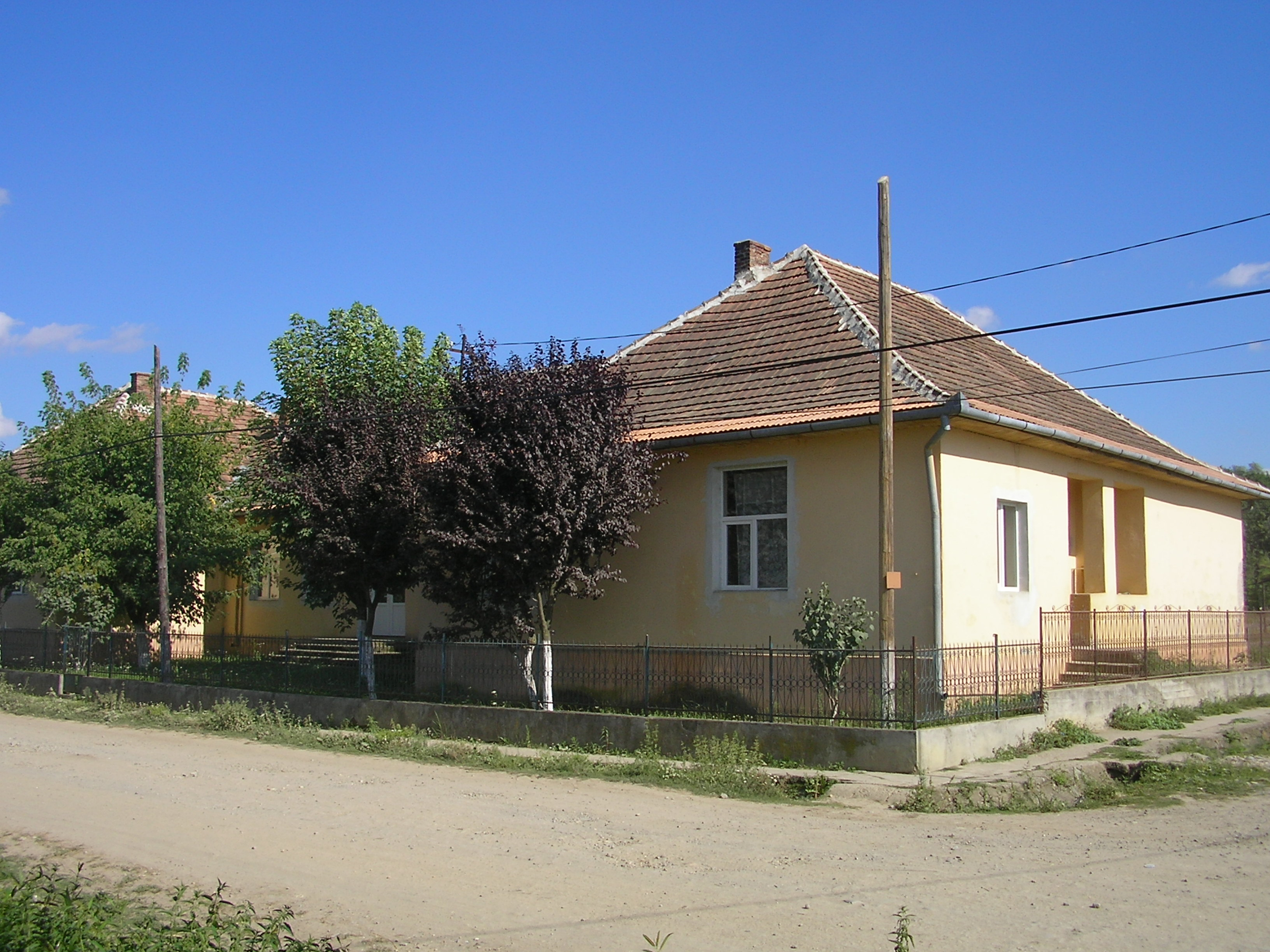 Şcoala nouă din Marin, judeţul Sălaj.